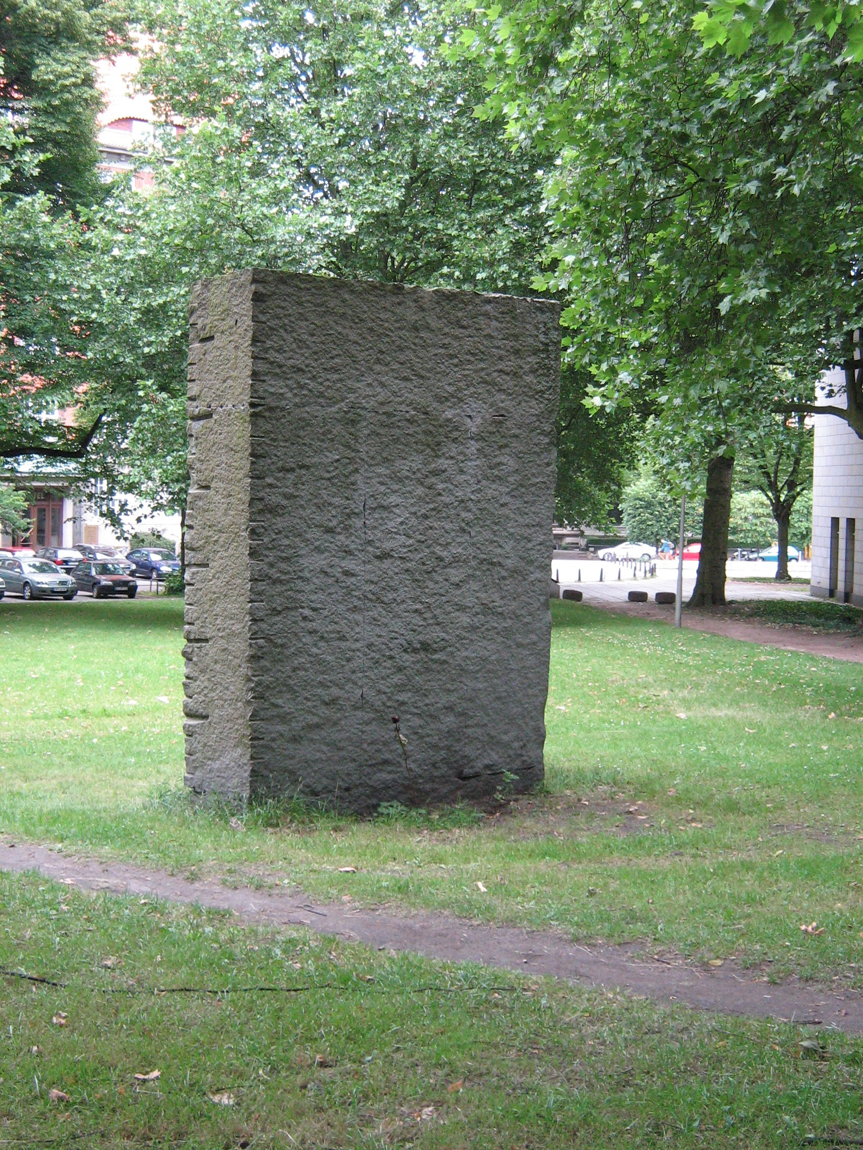 Mahnmal auf der Moorweide Hamburg, für jüdische Deportierte / Memorial for Deportation of Jews Moorweide, Hamburg , Germany